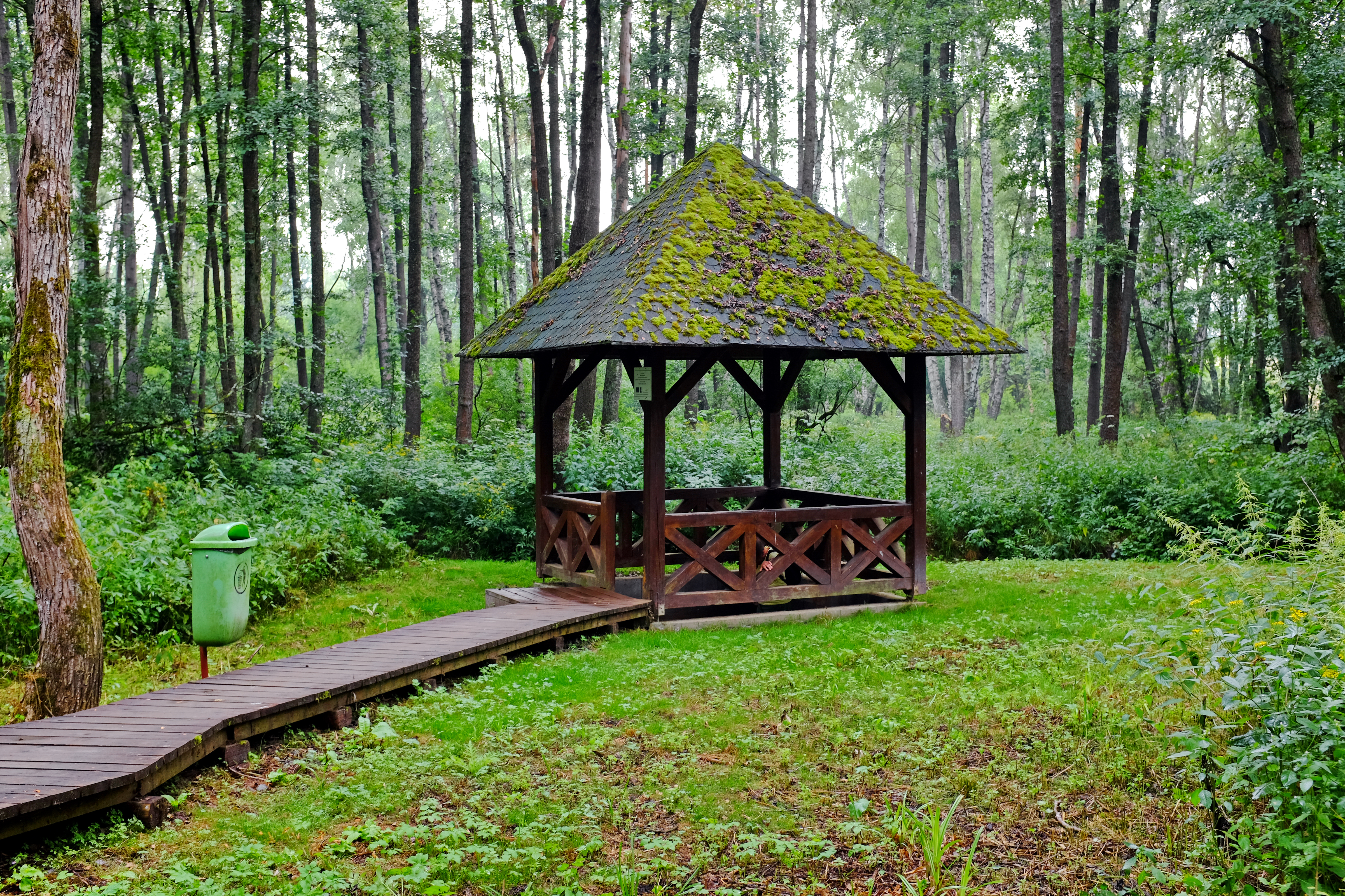 Jedlovská kyselka, Jedlová, osada obce Stará Voda, okres Cheb